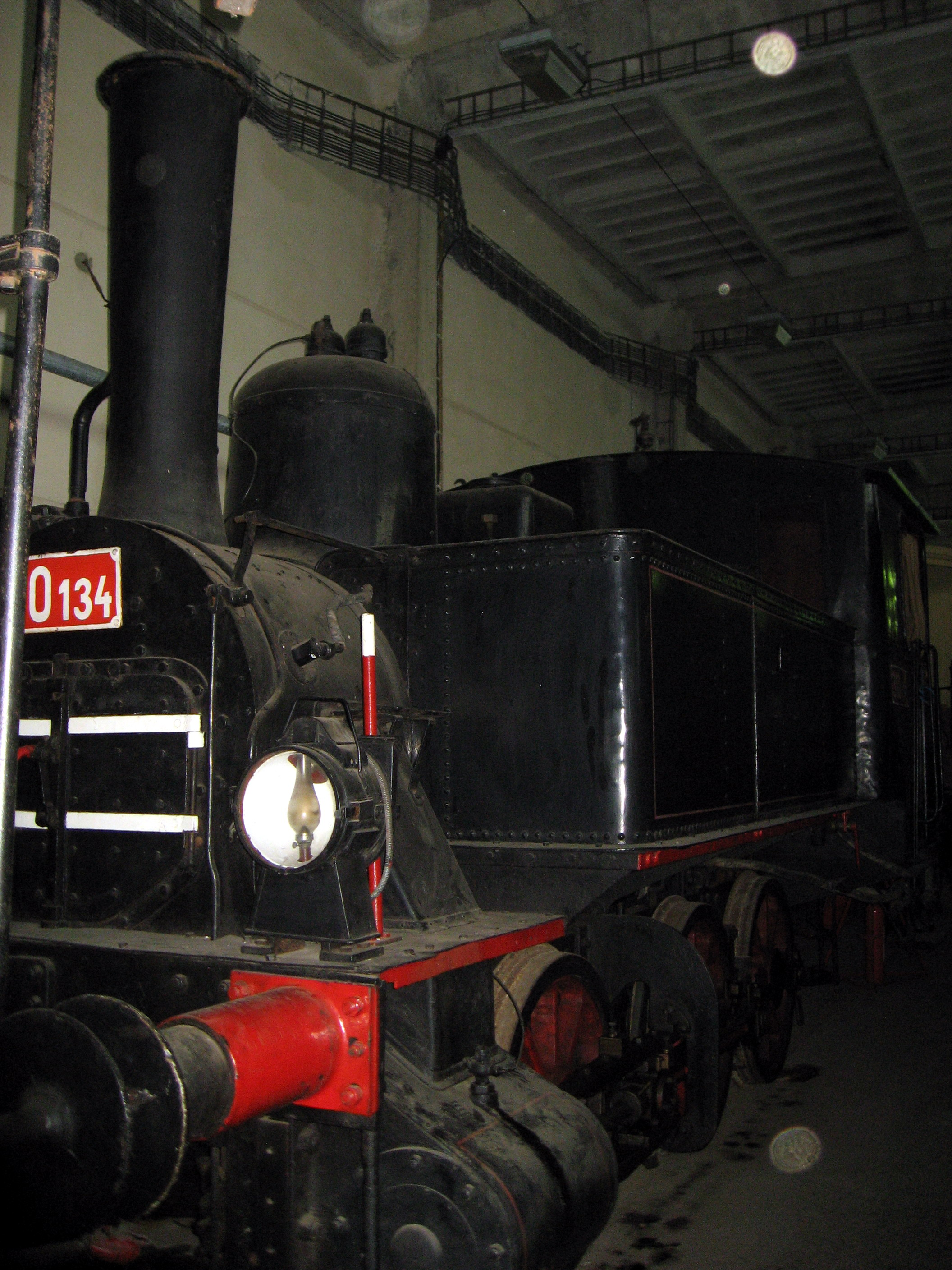 Parní lokomotiva 310.134, rok výroby 1900 – exponát Technického muzea v Brně, depozitář MHD v Líšni